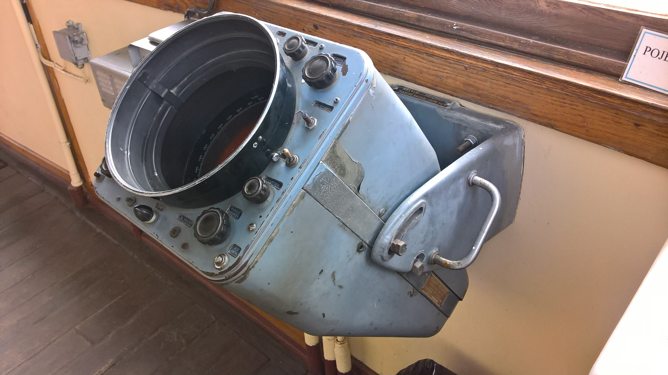 Radar Kelvin Hughes Type 14/9 na pokładzie statku-muzeum SS "Sołdek" w Gdańsku.